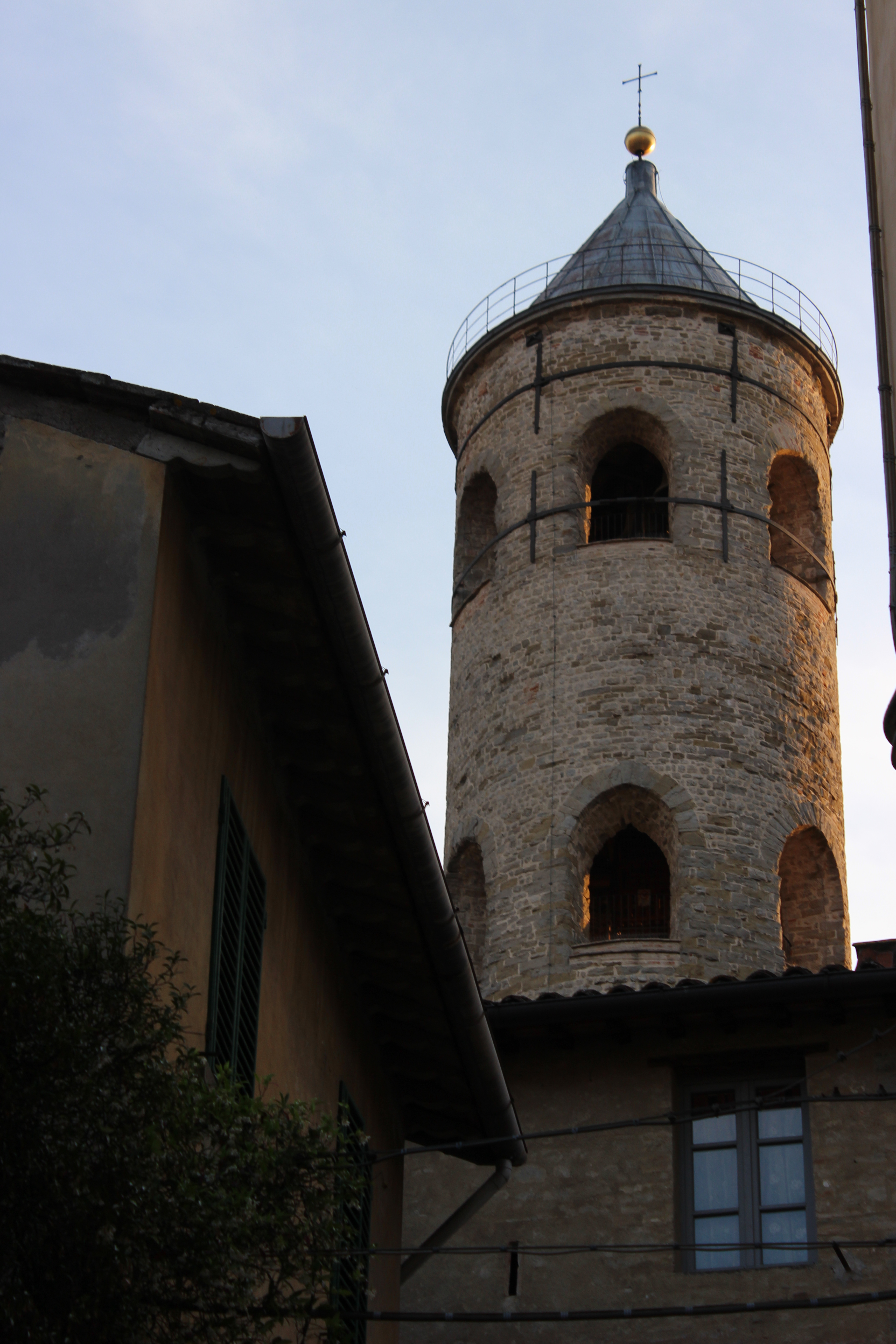 Città di Castello. Campanario de la catedral.